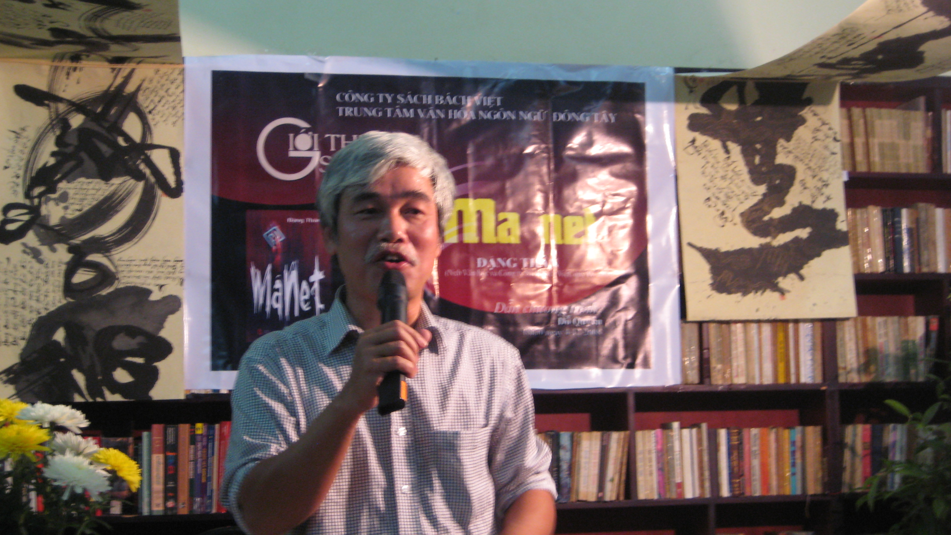 Thể loại: Hội Nhà văn Hà Nội Thể loại: Nhà phê bình văn học Việt Nam